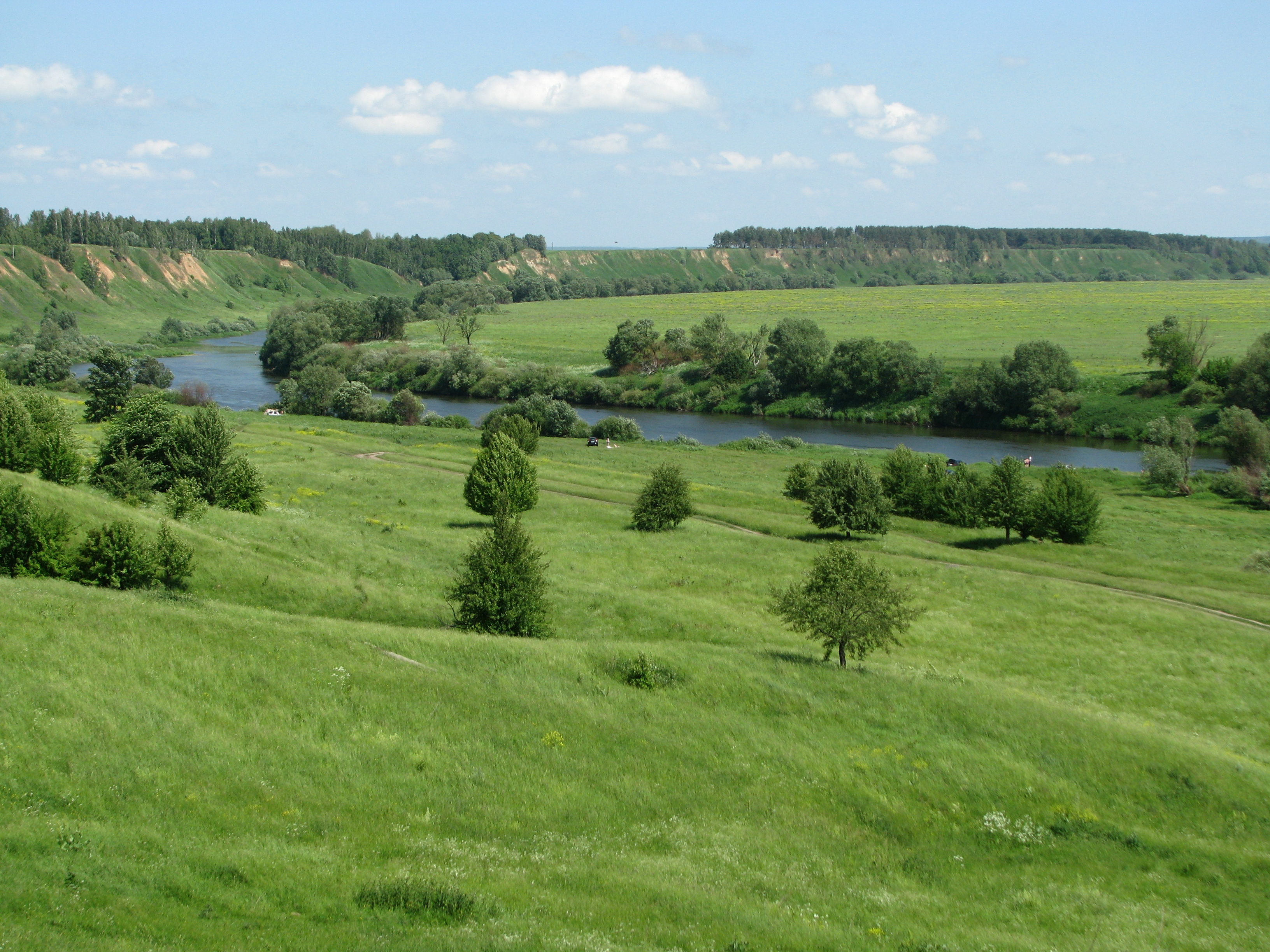 Чекалин (вид от памятника)